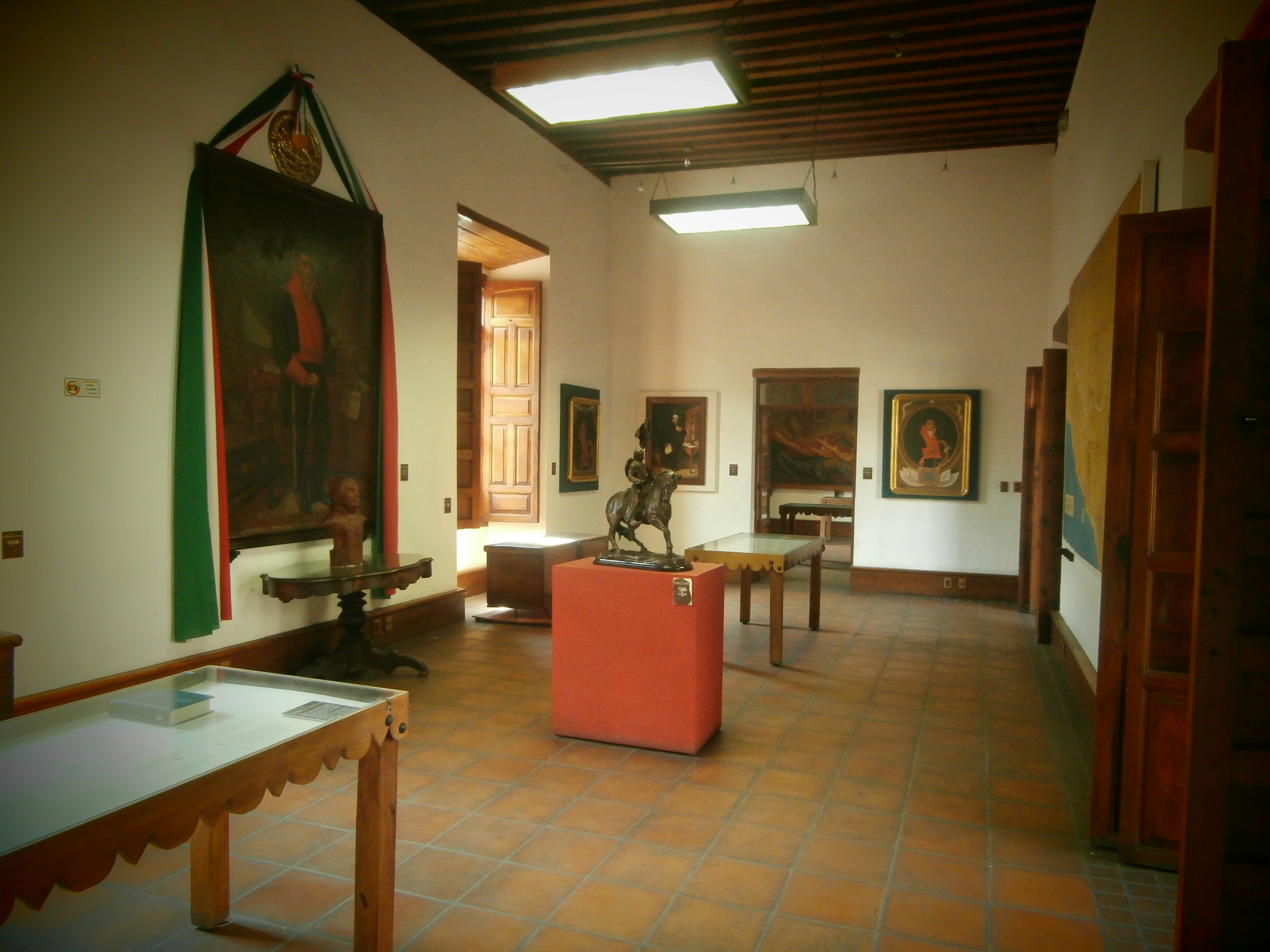 Museo de Sitio y Archivo Histórico Casa de Morelos Morelia